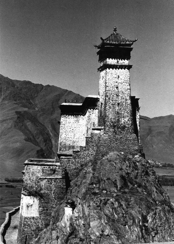 Ombulakhang